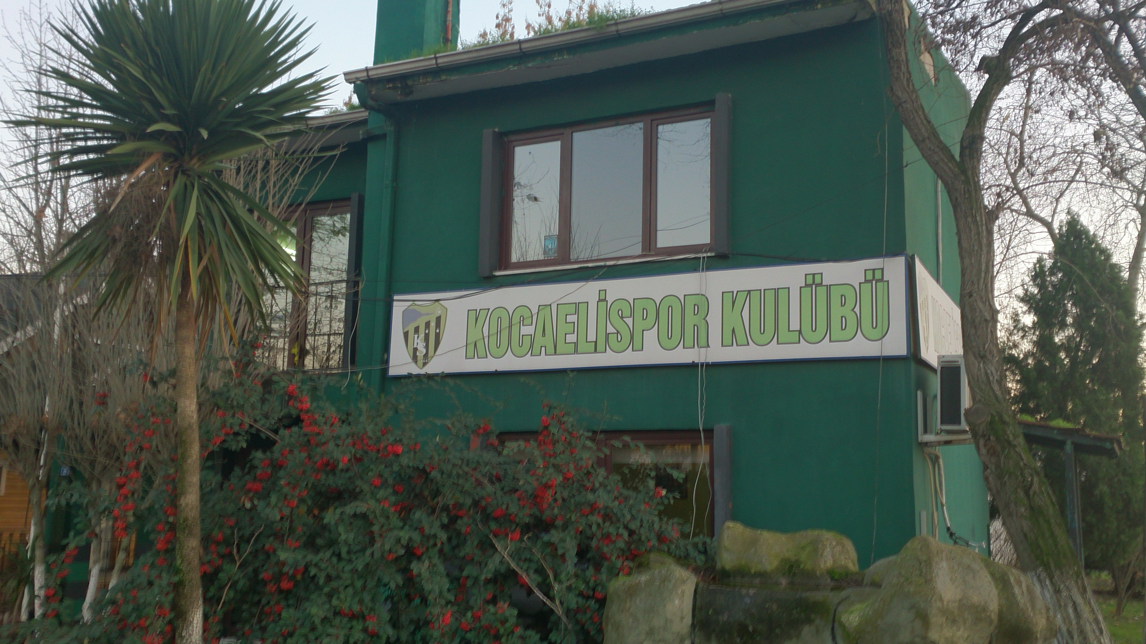 Kocaelispor club building